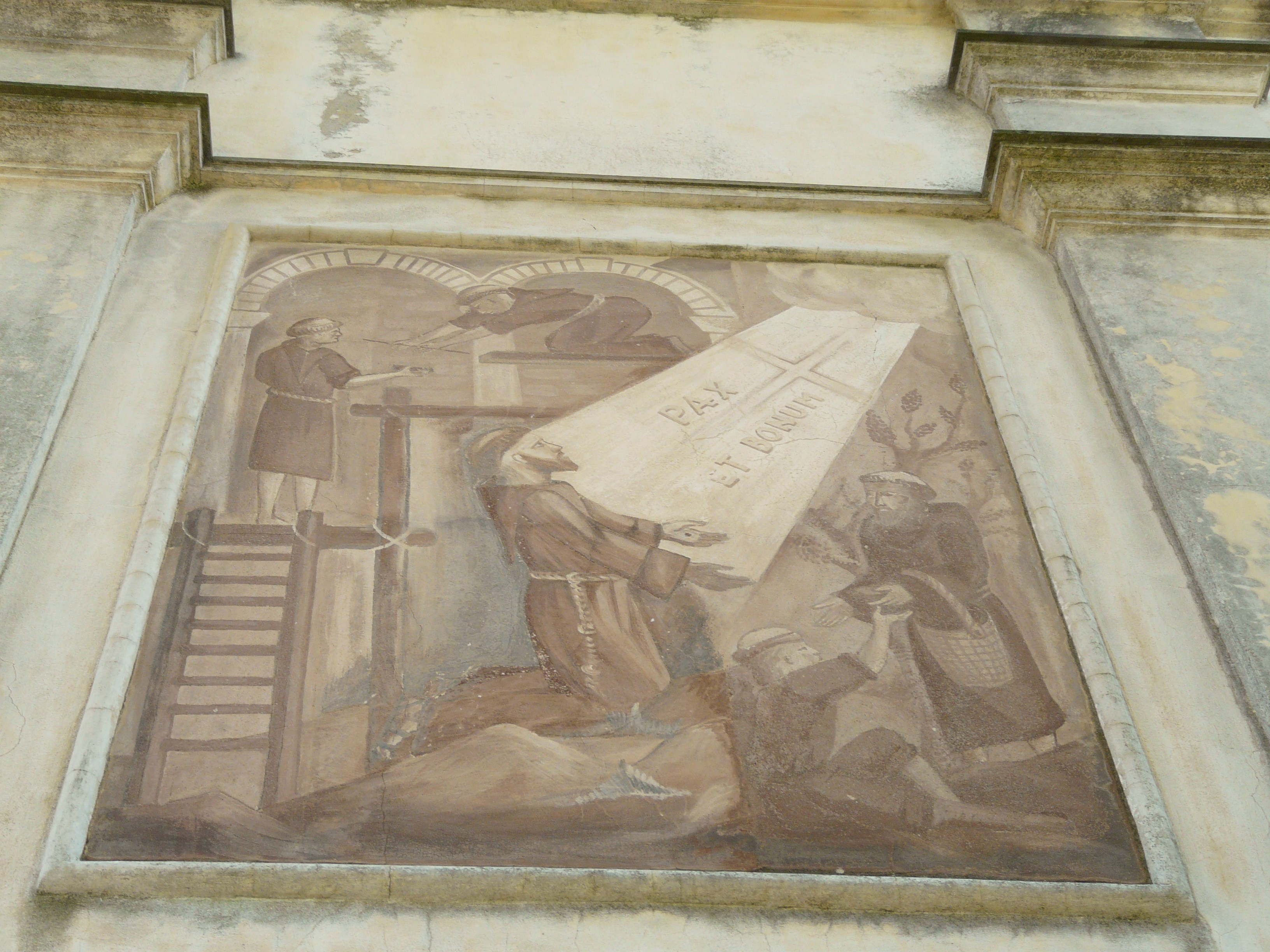 Affrresco della Chiesa di San Francesco, Piandeipreti, Tribogna, Liguria, Italia